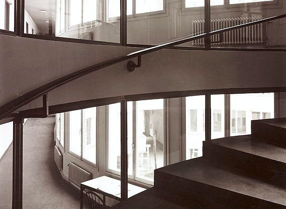 Riksförsäkringsanstalten Interiör, del av spiraltrappa med glaspartier från IDESTA